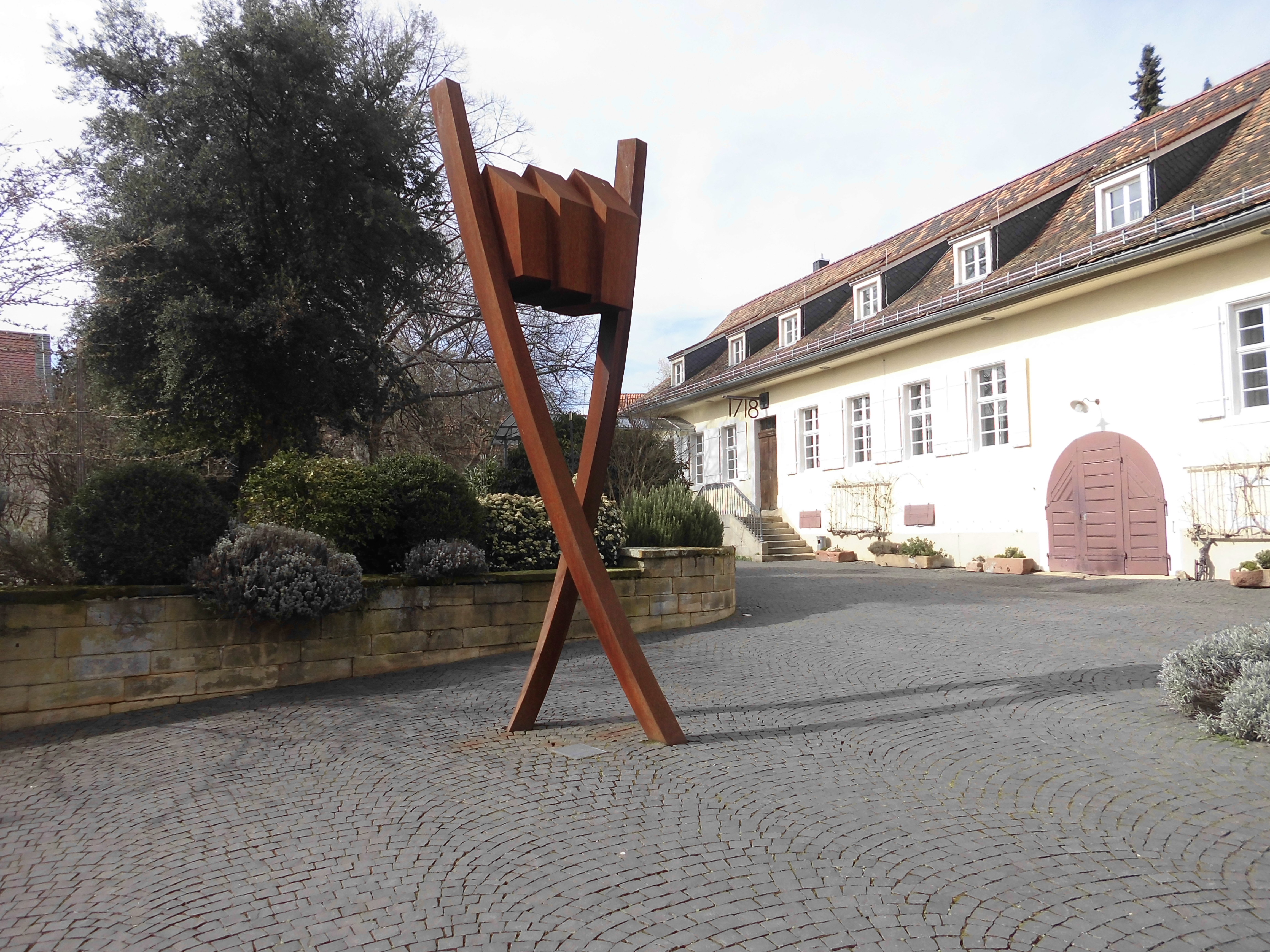 Skultpur im Ketschauer Hof: Drei Häuser werden von zwei Stangen zusammengehalten. Die Skulptur soll daran erinnern, dass Achim NIederberger mit dem Erwerb der drei großen Deidesheimer Weingüter von Winning, Reichsrat von Buhl und Geheimer Rat Dr. von Bassermann-Jordan die sog. Jordansche Teilung in gewissem Sinne wieder rückgängig gemacht hat